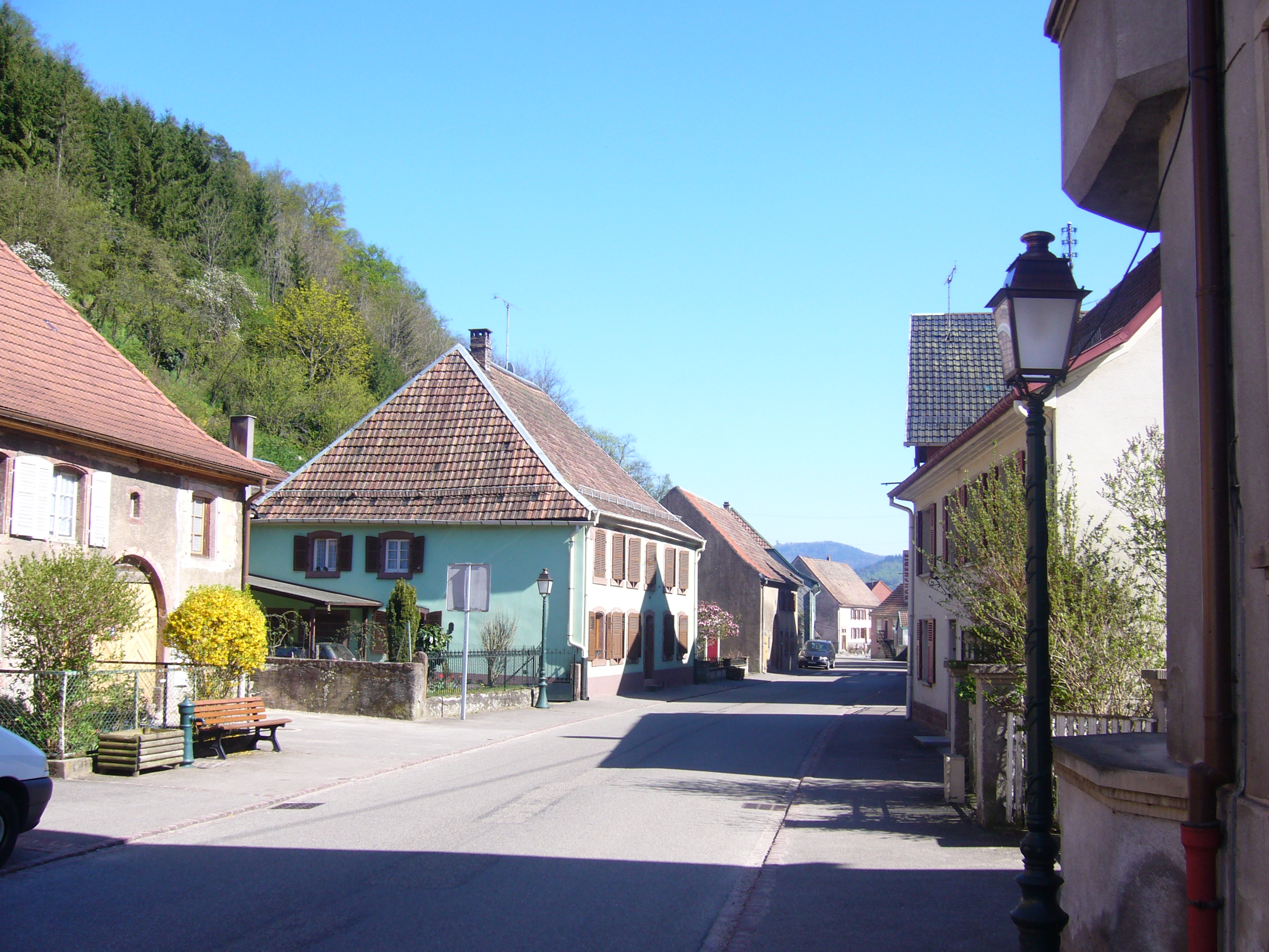 Le centre du village et la rue du Général de Gaulle